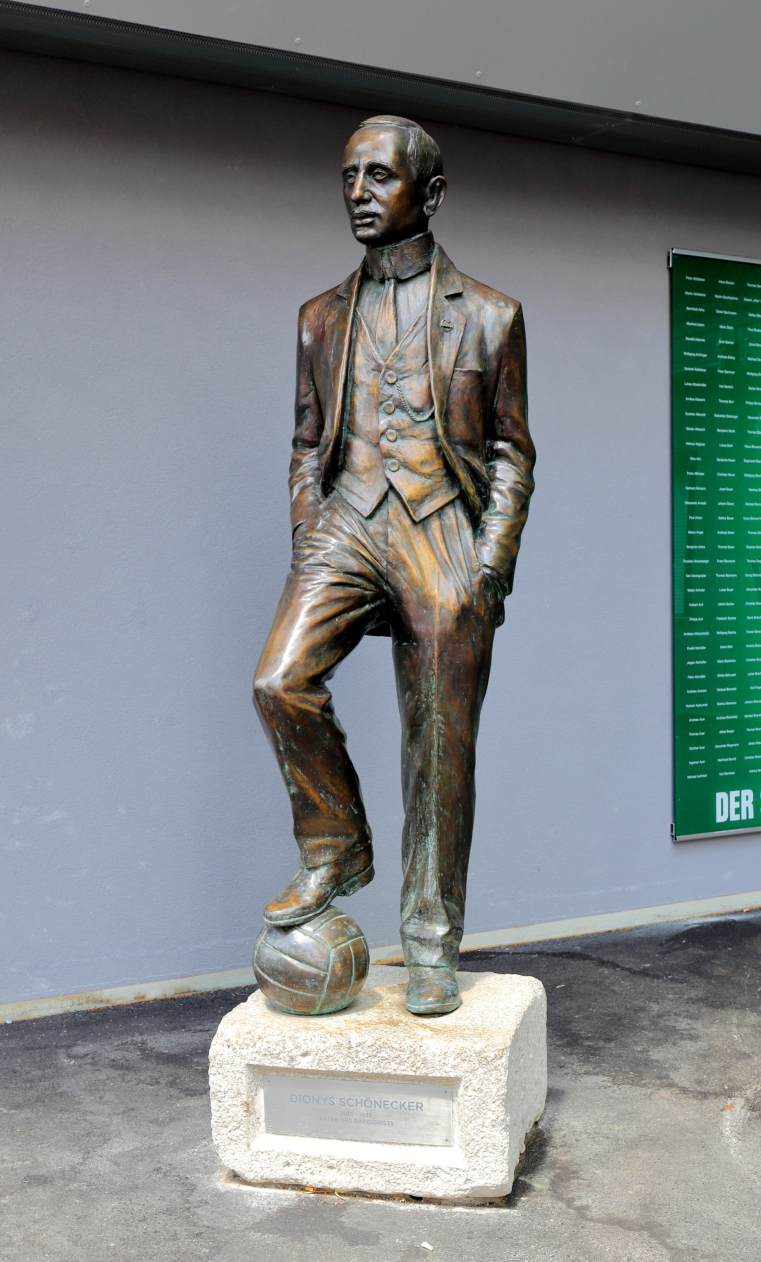 Die lebensgroße Dionys Schönecker-Statue vor dem Allianz Stadion in Hütteldorf, ein Bezirksteil des 14. Wiener Gemeindebezirkes Penzing.Die Bronzestatue, ein Werk von Thomas Rydval, wurde im Zuge der Eröffnung des Rapidmuseum "Rapideum" am 14./15. Dezember 2011 enthüllt. Im Zuge des Neubaues des Stadion wurde die Statue im Juli 2016 rechts vom VIP-Eingang bzw. links beim Fan-Shop-Eingang aufgestellt. Unter Schönecker wurde Rapid von 1912 bis 1938 zwölfmal Meister, gewann dreimal den Wiener Pokal und 1930 den Mitropacup.